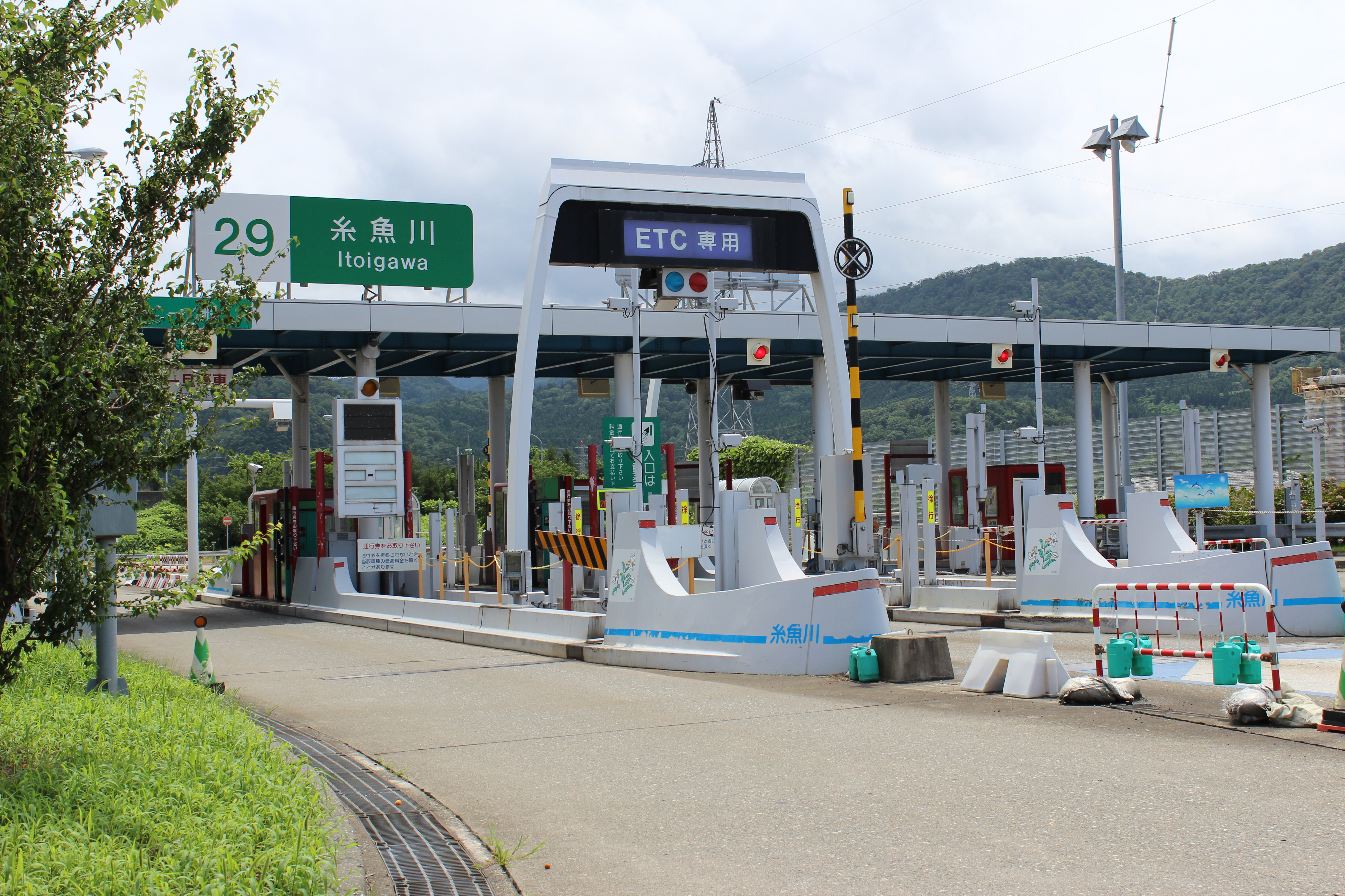 北陸自動車道糸魚川インターチェンジ料金所。